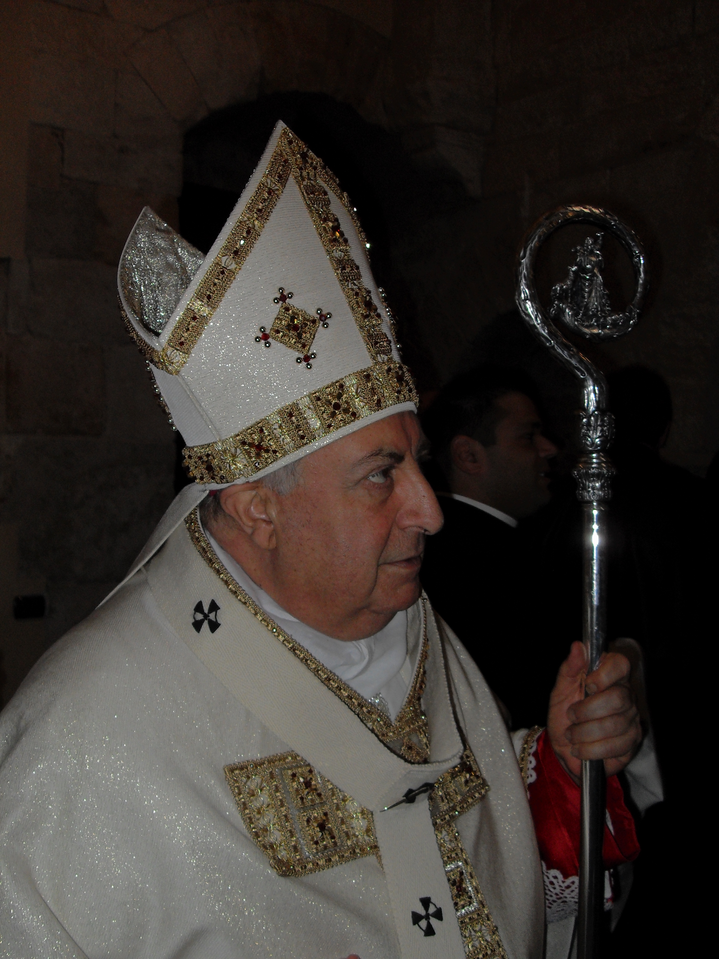 Io sottoscritto Luigi Salvatore Vadacchino, utente di Wikipedia sotto il nome di Lodewijk Vadacchino, cedo l'immagine SDC11083.JPG a Wikimedia Italia, sotto licenza CC-BY-SA, con il nome Salvatore_Nunnari_8.jpg. L'Immagine fotografica raffigura l'Arcivescovo di Cosenza-Bisignano in abiti cerimoniali. vostro come sempre--17:42, 1 apr 2010 (CEST)